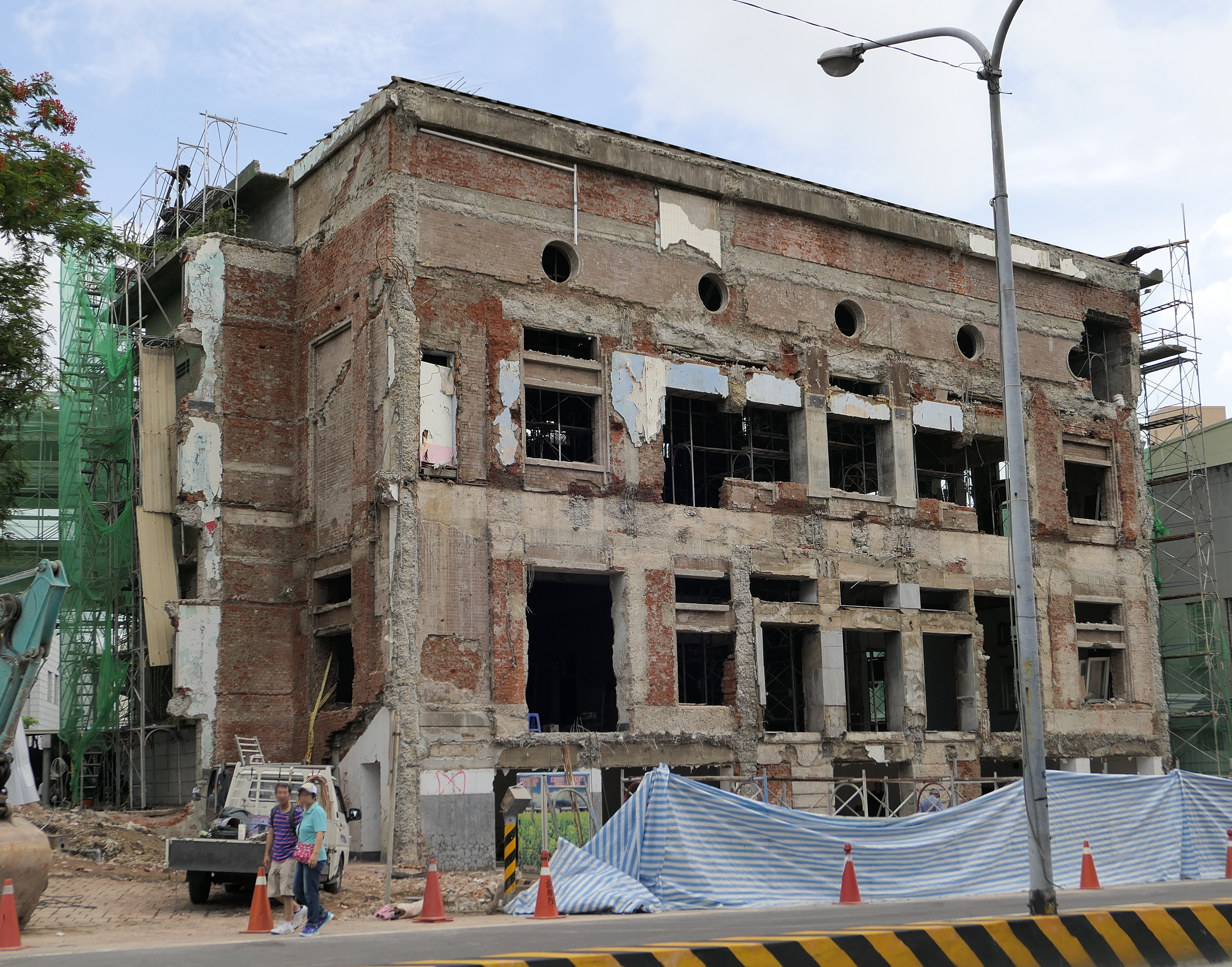 中文（台灣）: 整修中的原臺南州會，二次大戰後加蓋的部分已拆除。